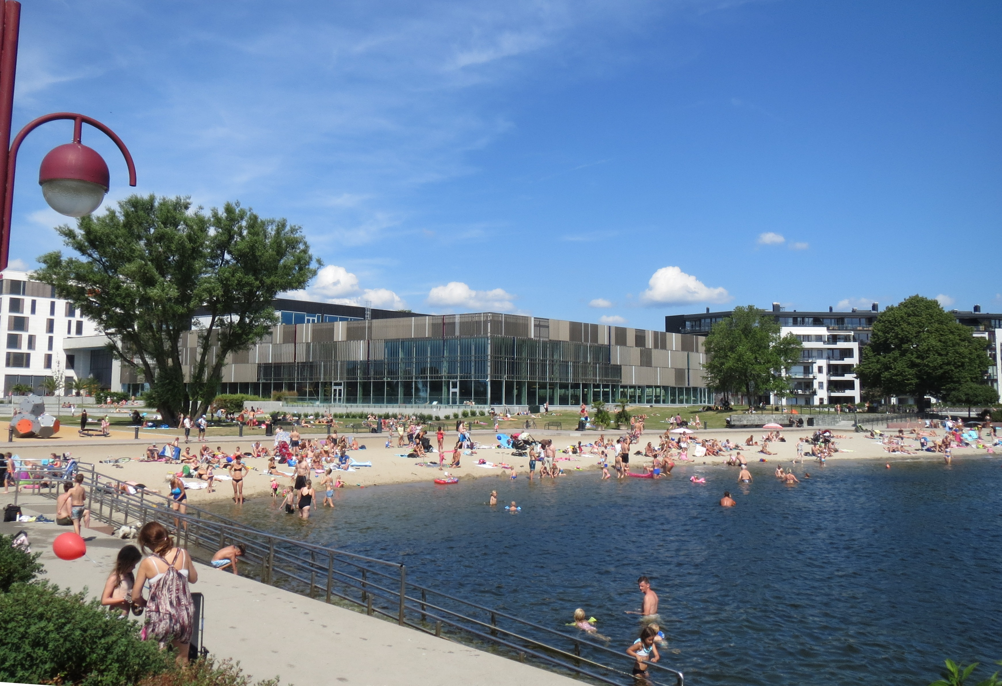 Bystranda i Kristiansand, juli 2014